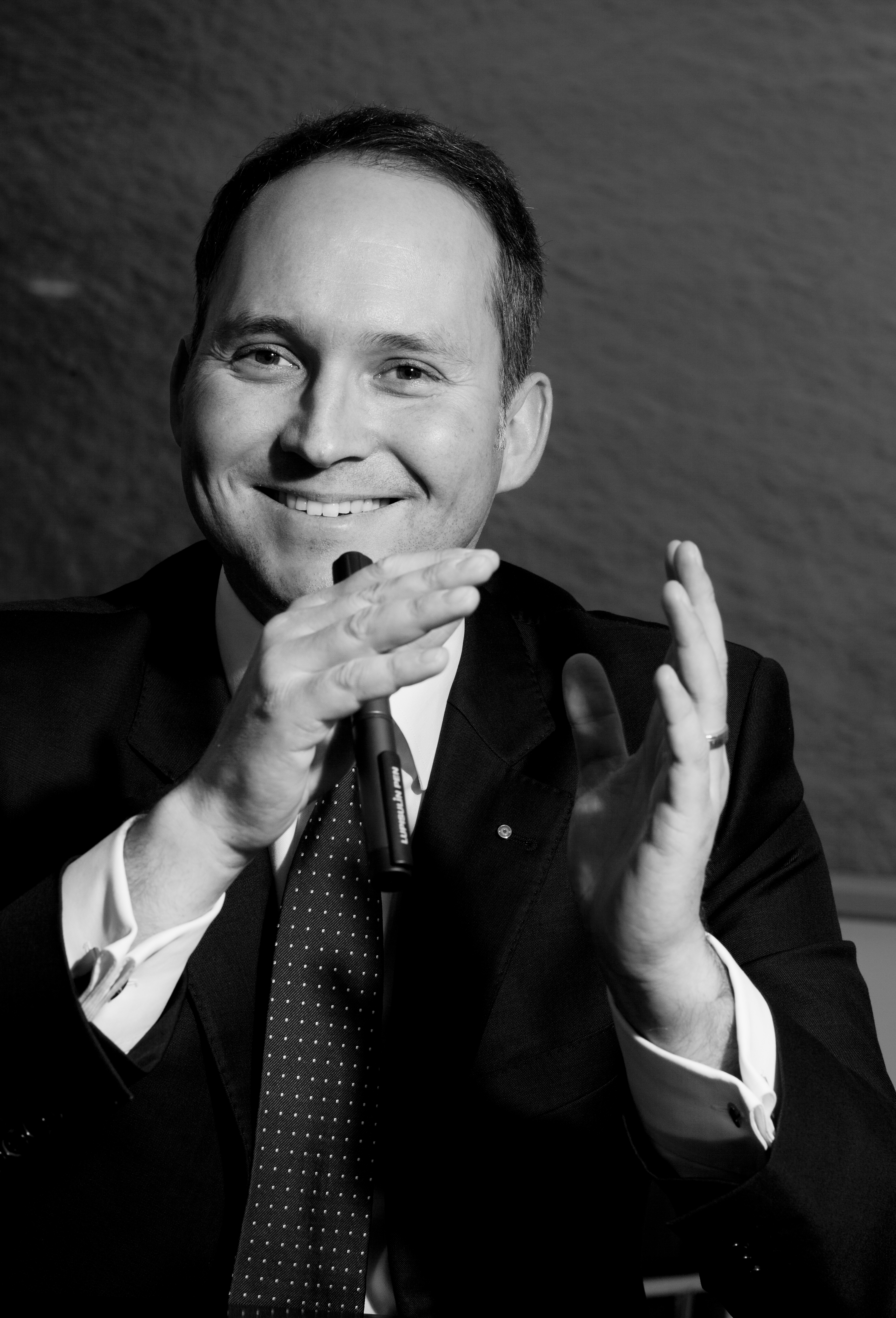 Simon Michel, CEO Ypsomed Gruppe